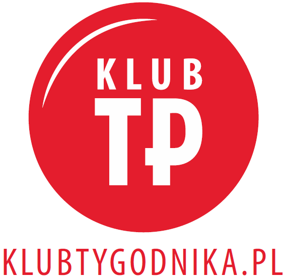 Logo Klubu "Tygodnika Powszechnego". Autor: Filip Biały